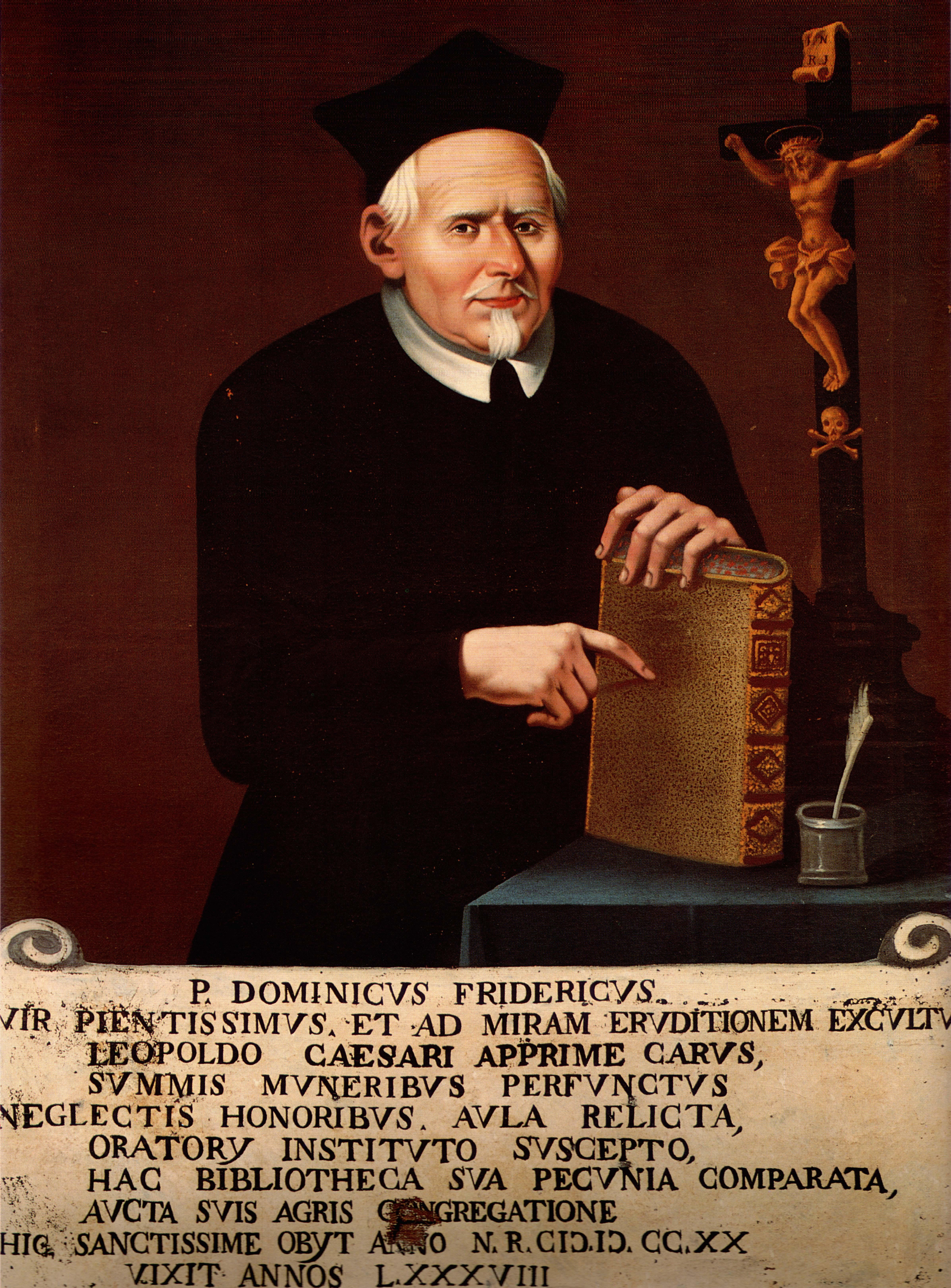 Ritratto di Domenico Federici (1633-1720) in abiti religiosi, conservato presso la Sala dei Globi della Biblioteca Federiciana di Fano (autore sconosciuto, dipinto dopo il 1721).